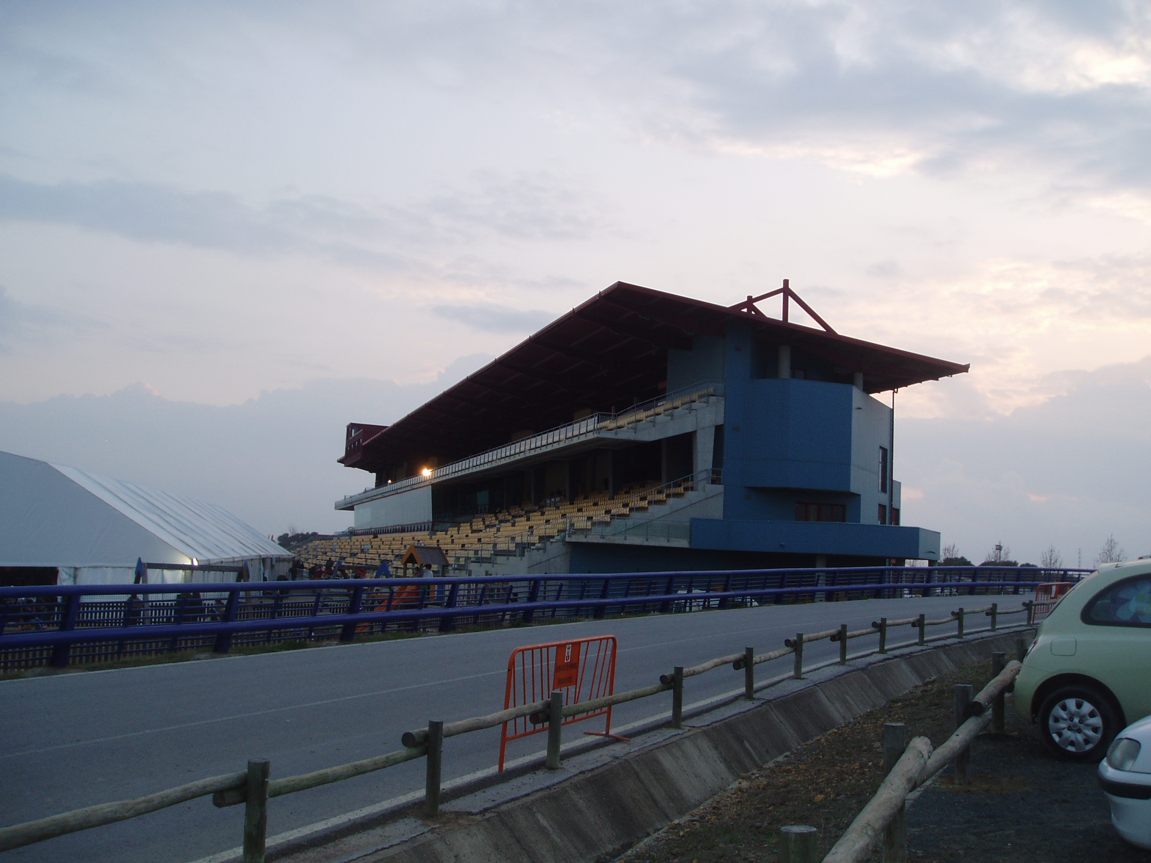 Hipódromo de Dos Hermanas (Sevilla) españa